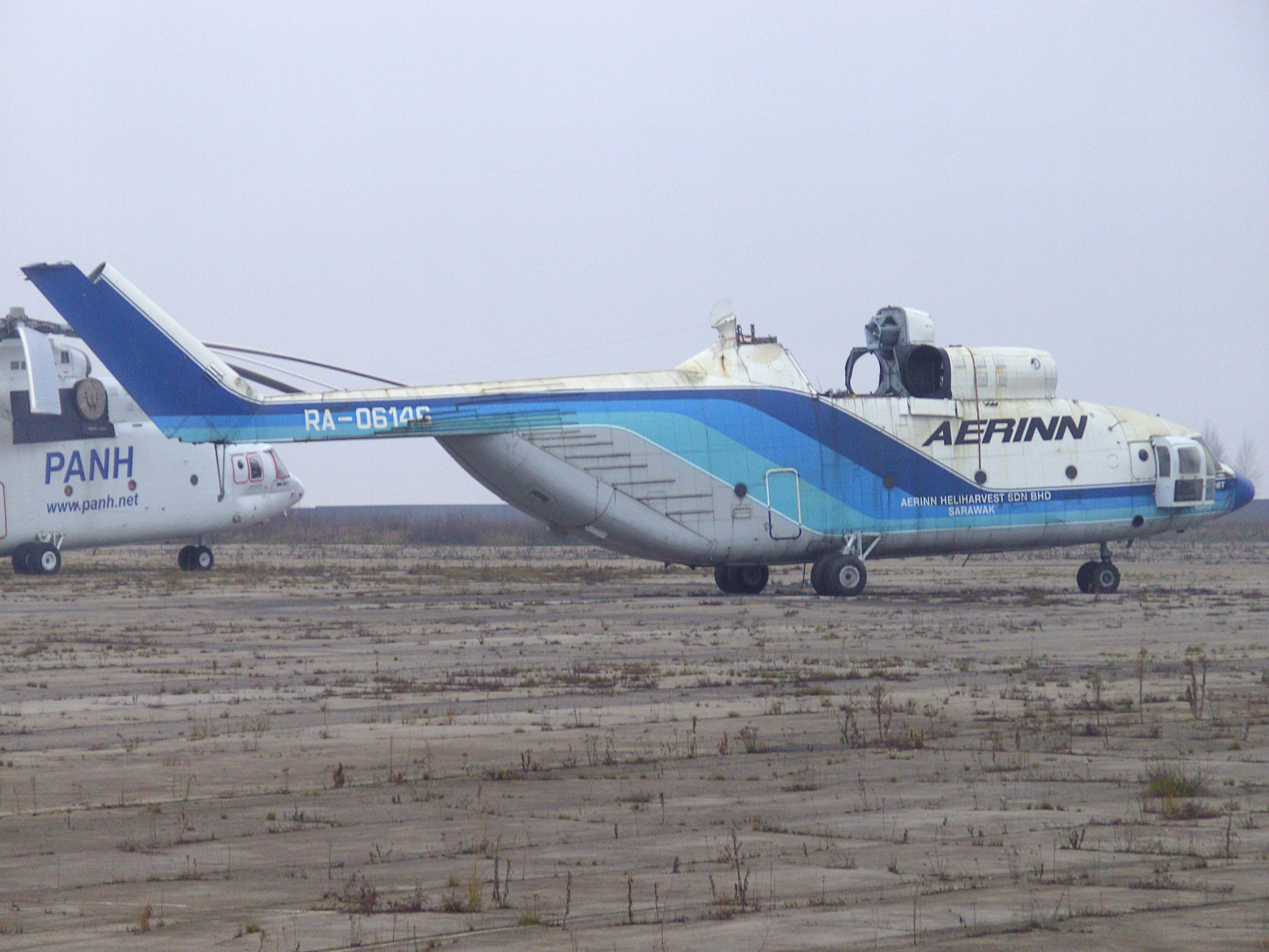 Ми-26НЕФ-М